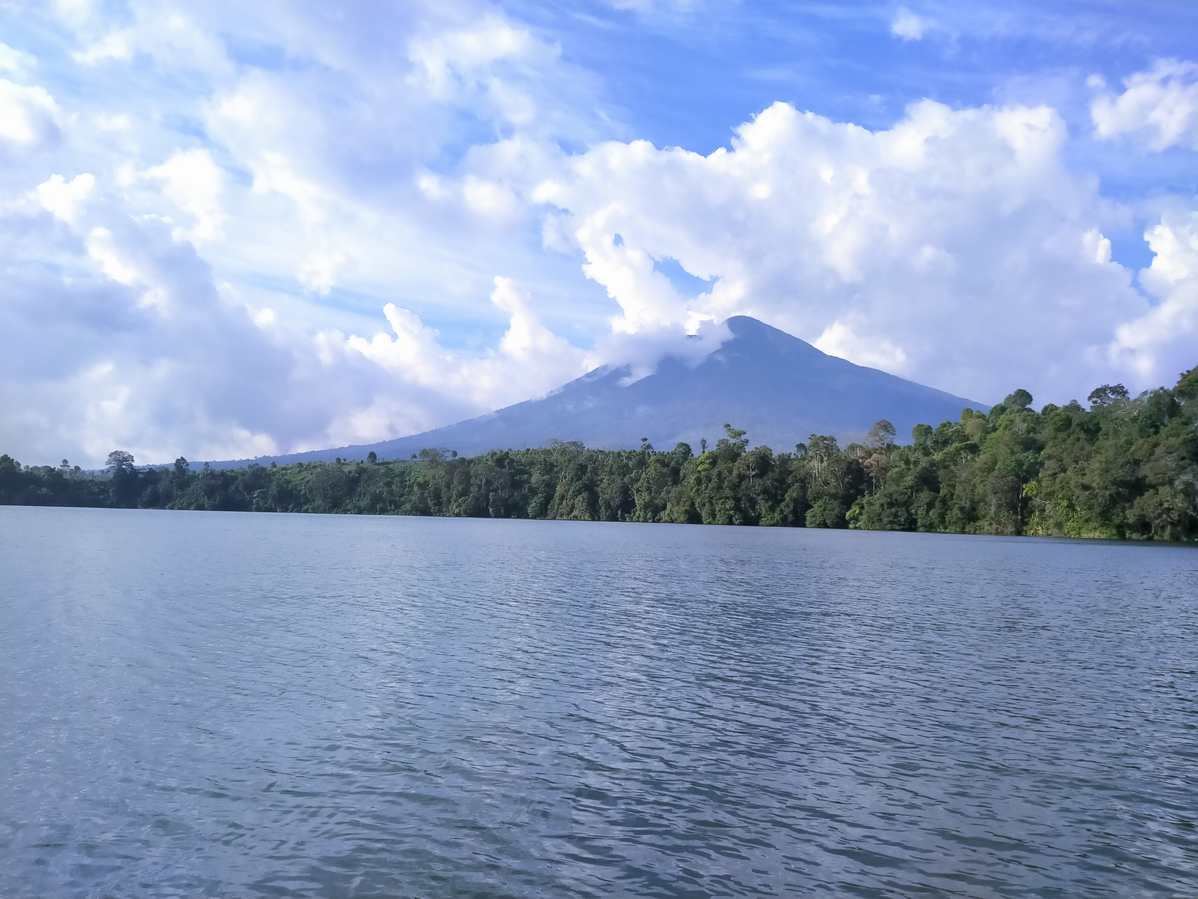 Danau Pauh dan Gunung Masurai